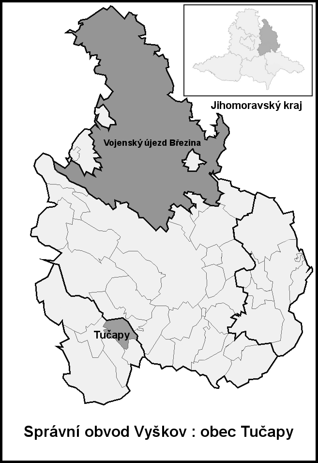 Hranice Tučapy (Vyškov- czech republic)